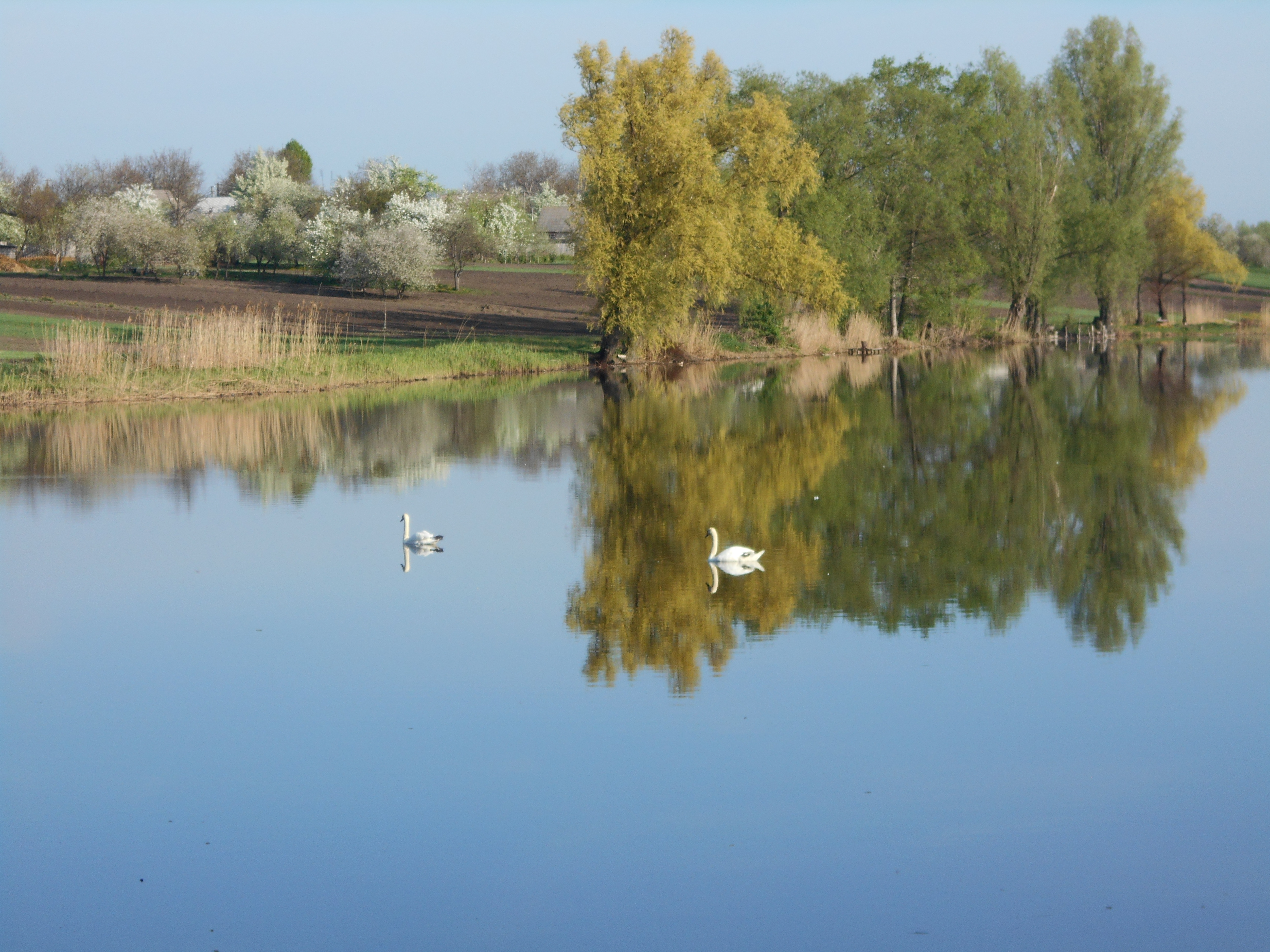 Stanislavchyk, Cherkas'ka oblast, Ukraine, 20611